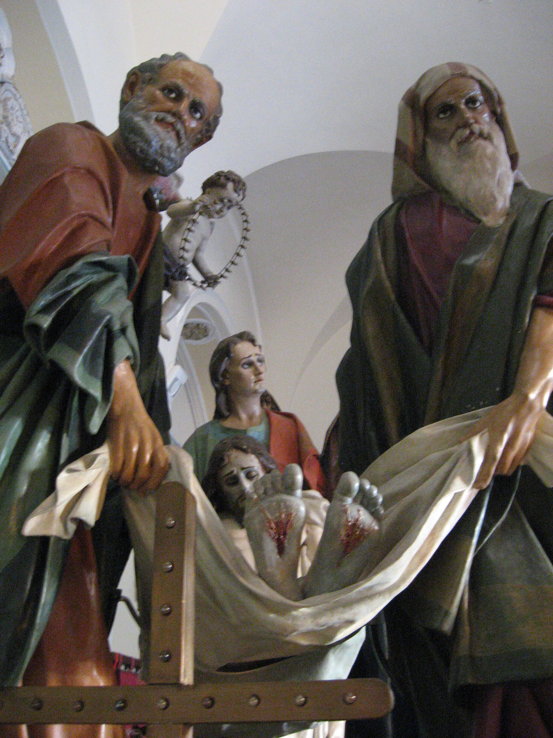 Statua degli Otto Santi, Ruvo di Puglia